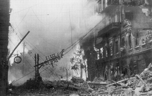 Україна. Київ. Вид на вулицю Прорізна з Хрещатика